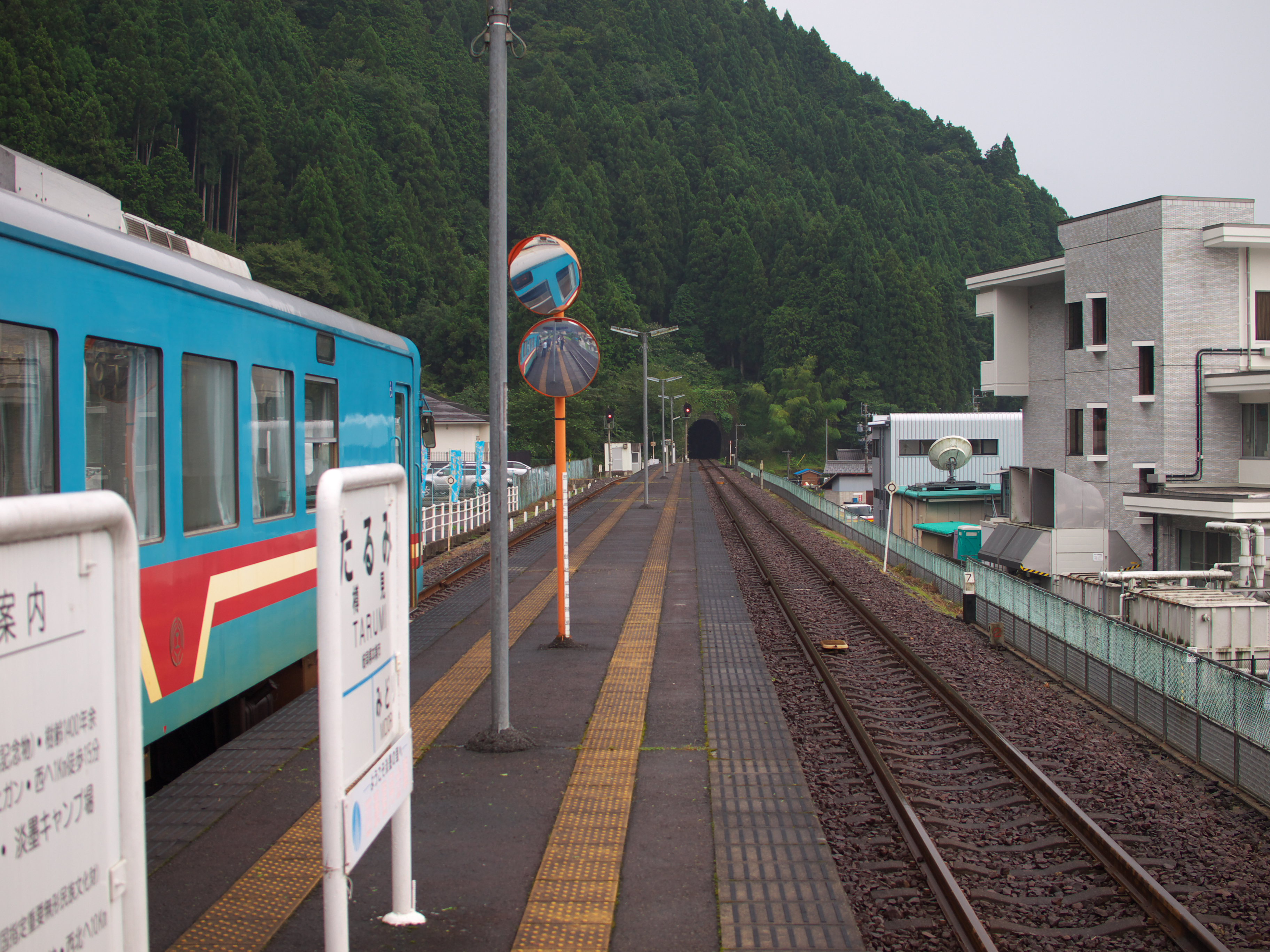 Tarumi Station